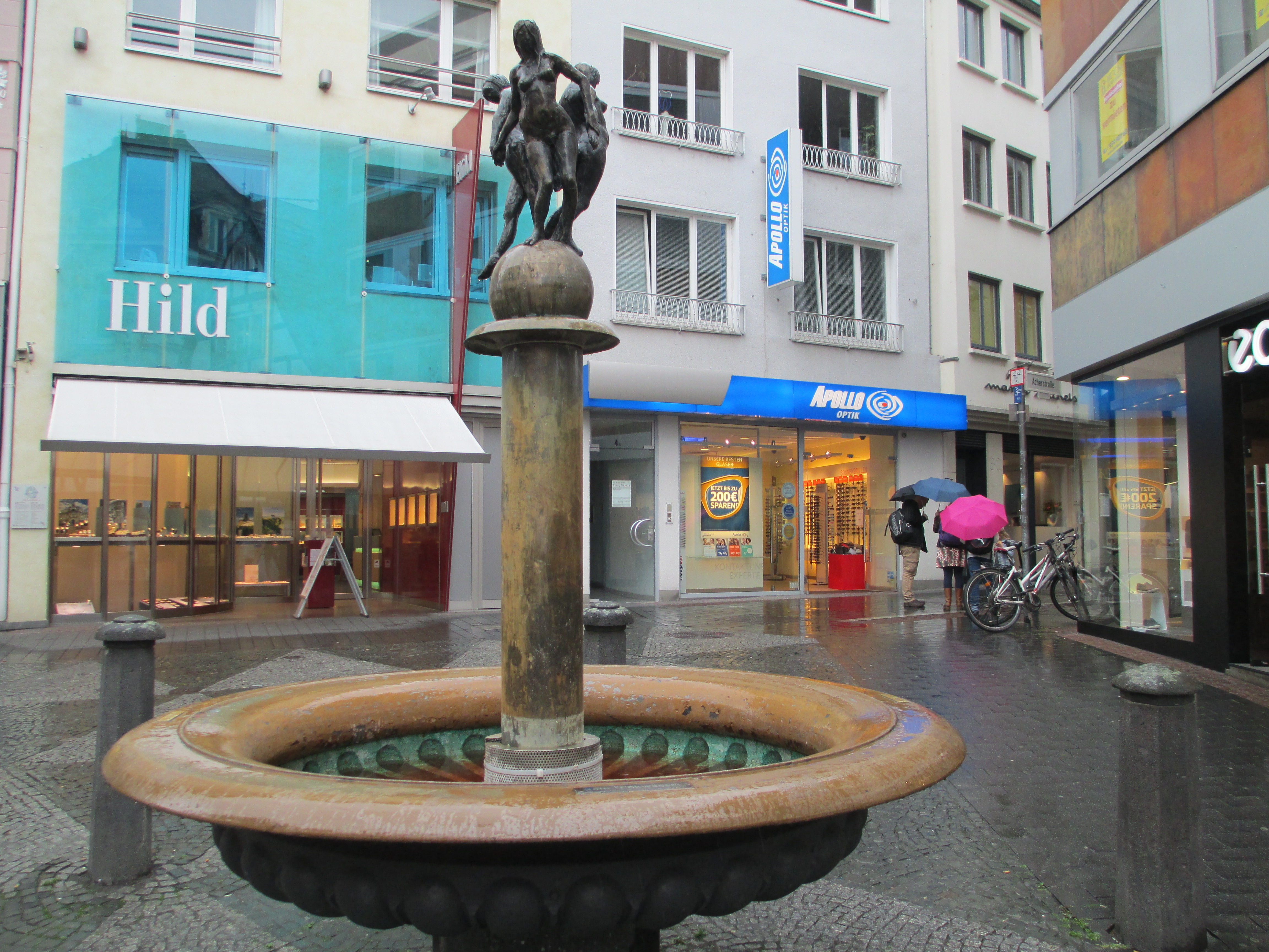 מזרקת שלושת הגראציות בבון